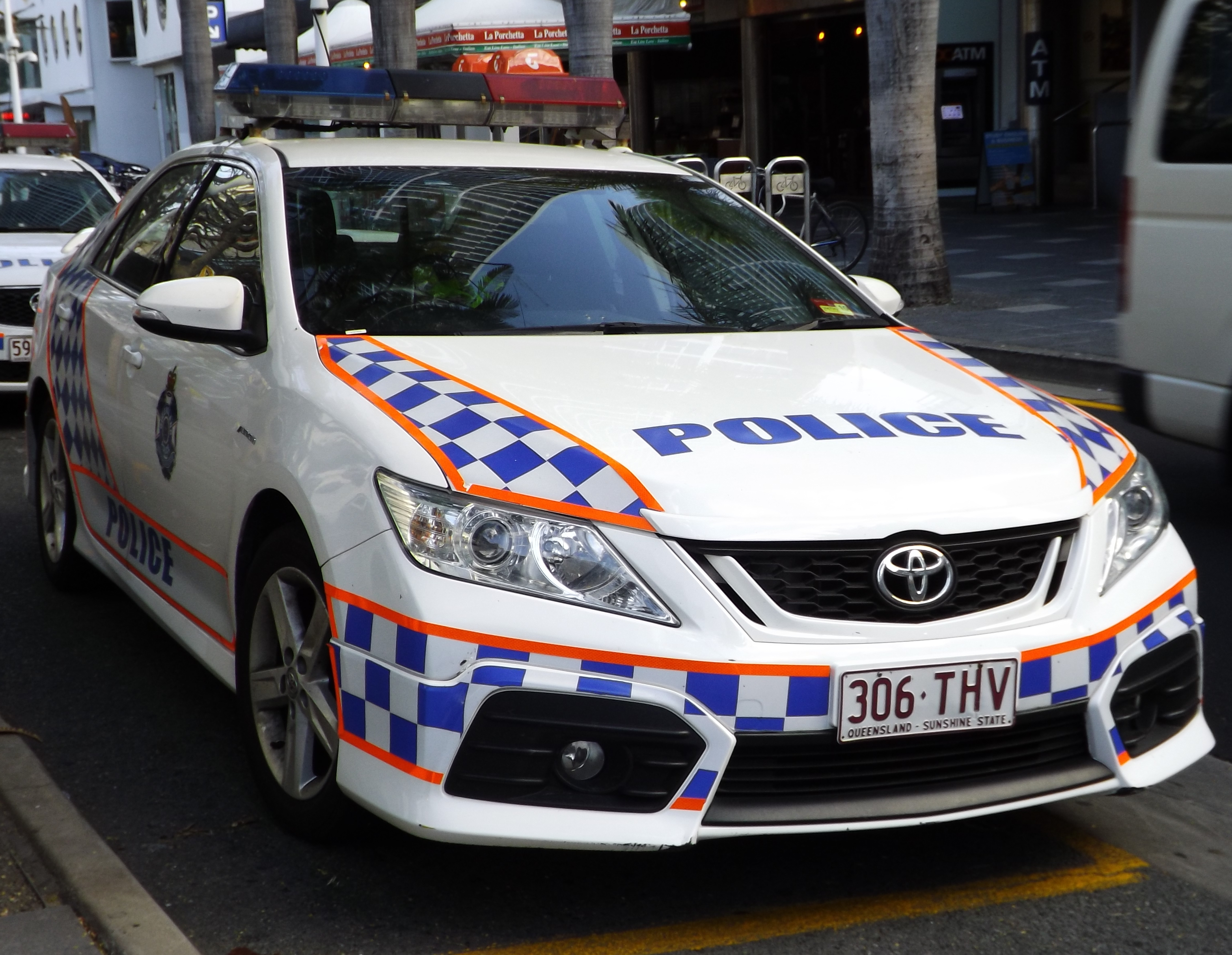 オーストラリアの警察車輛